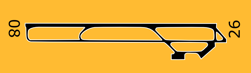 Croquis del aeropuerto internacional Presidente Perón de Neuquén, Argentina